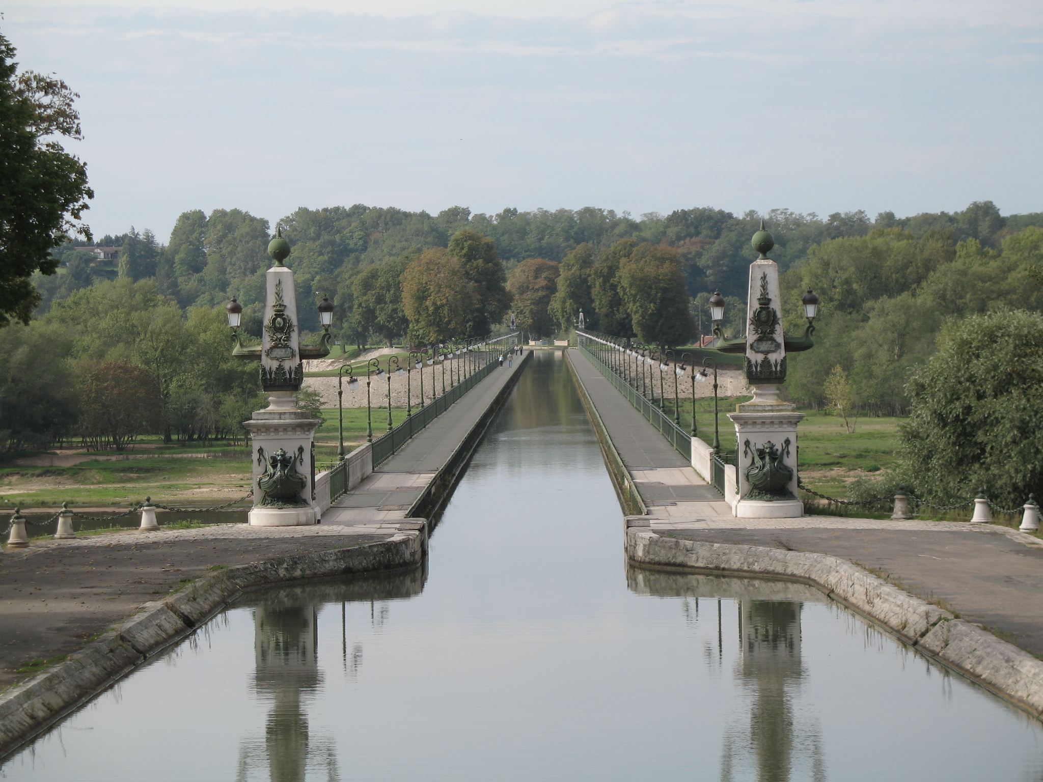 Pont Canal de Briare (FRANCE) 30/12/2006 auteur : Michel CLAIR